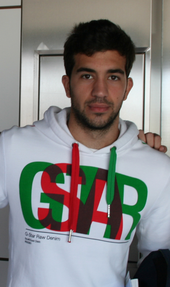 Fernando Pacheco cuando era juvenil